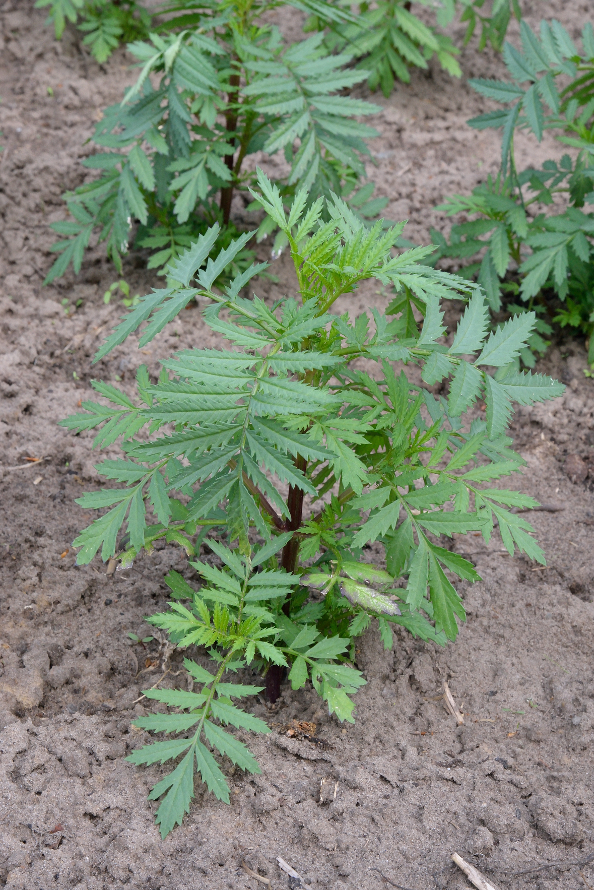 Tagetes patula uitgeplant